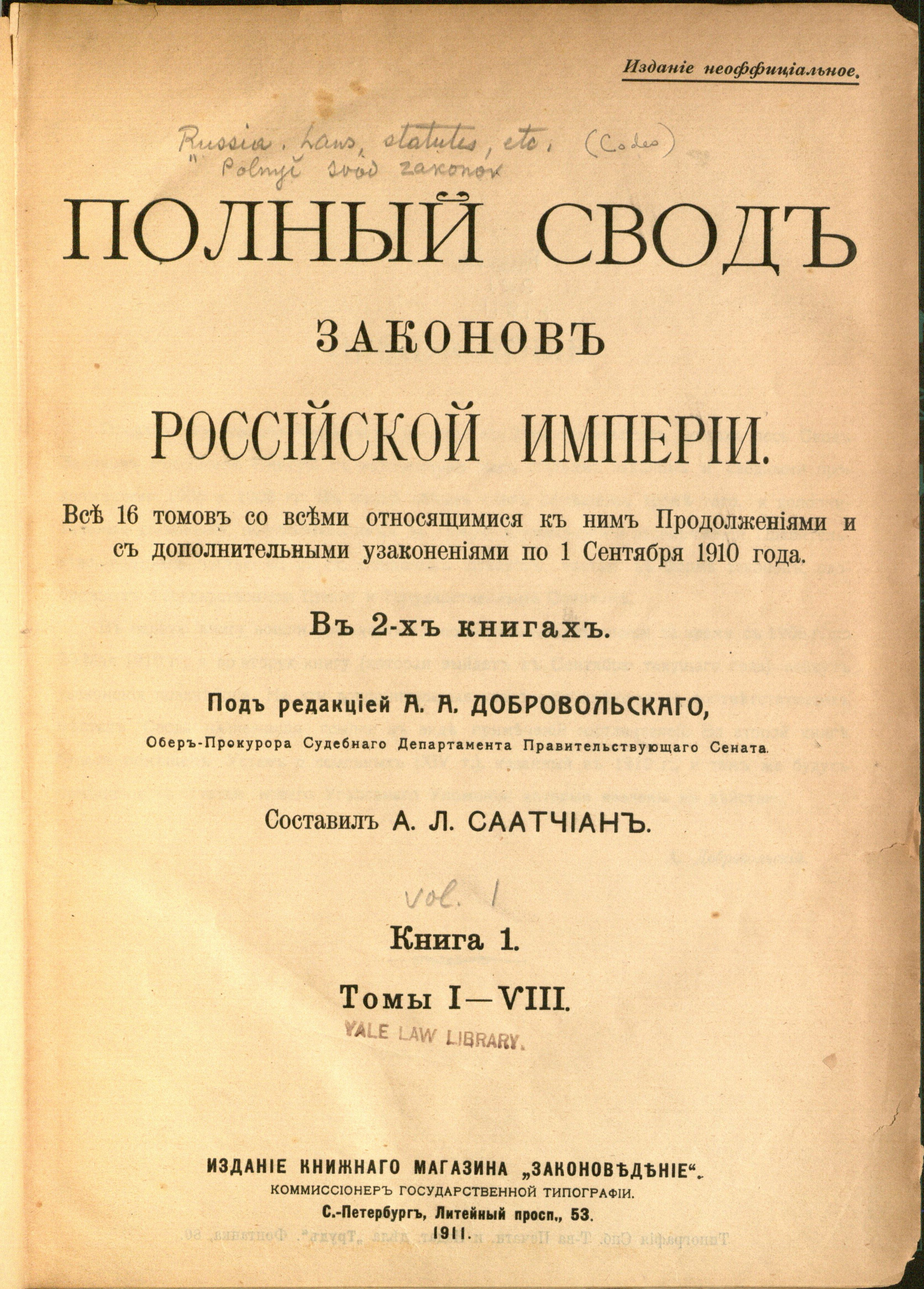 Полный Свод законов Российской империи